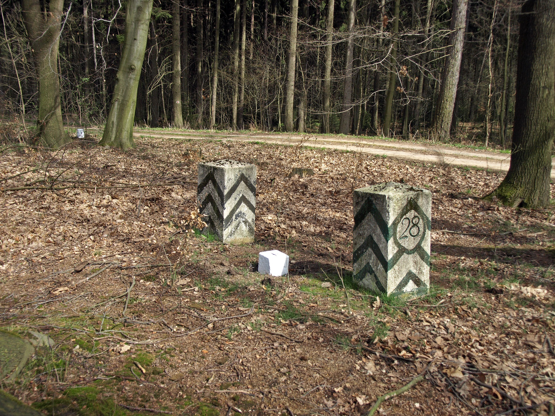 Grenzsteine Nr. 28 - Historische Landesgrenze Königreich Sachsen Königreich Preußen 1815 (Wiener Kongress)